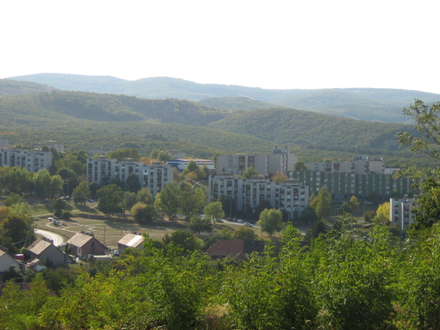 Miskolc-Komlóstető